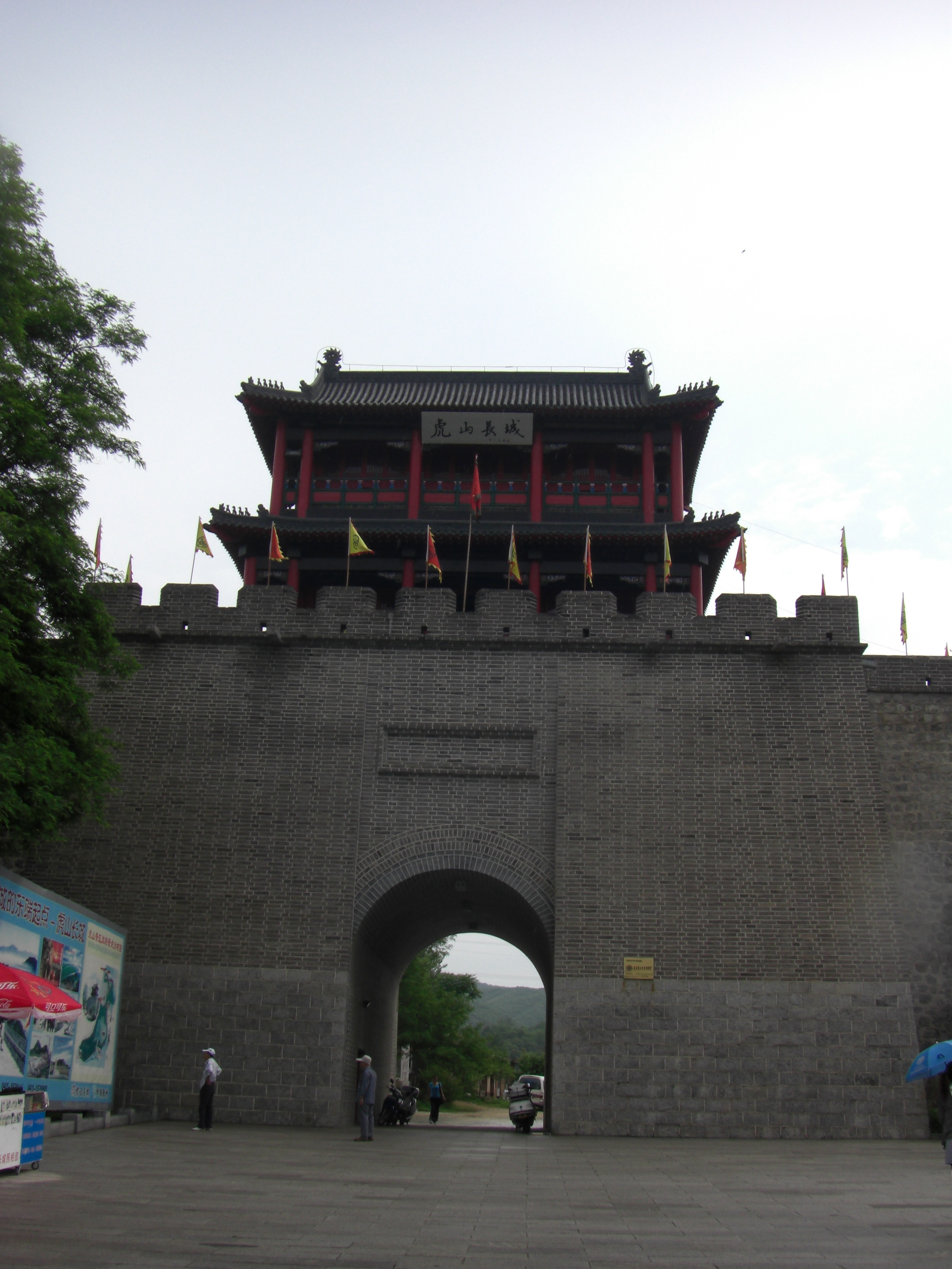 虎山長城の門